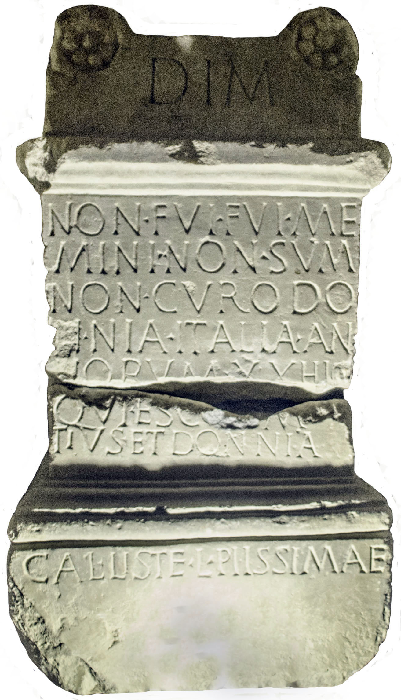 Épitaphe de Donnia Italia, Ier-IIe s. Musée Eugène-Camoreyt de Lectoure, Gers, France.